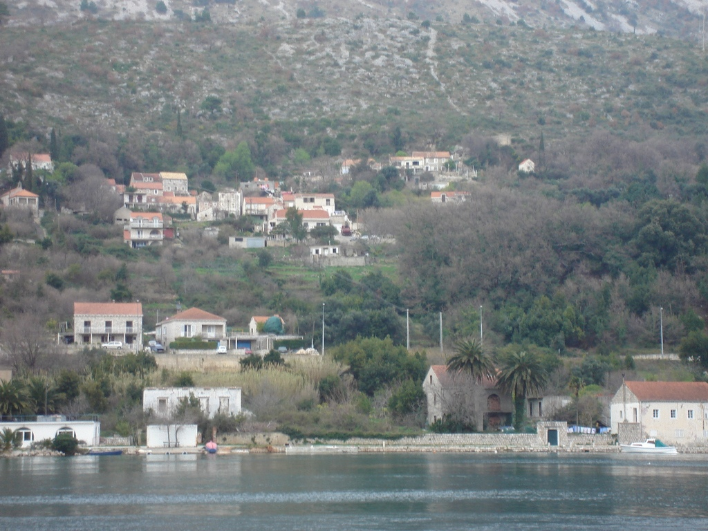 Village Prijevor near Dubrovnik